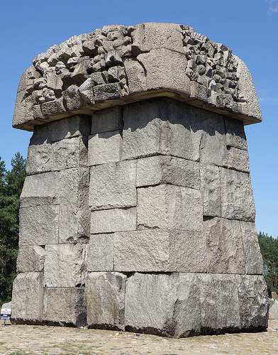 Treblinka Memorial